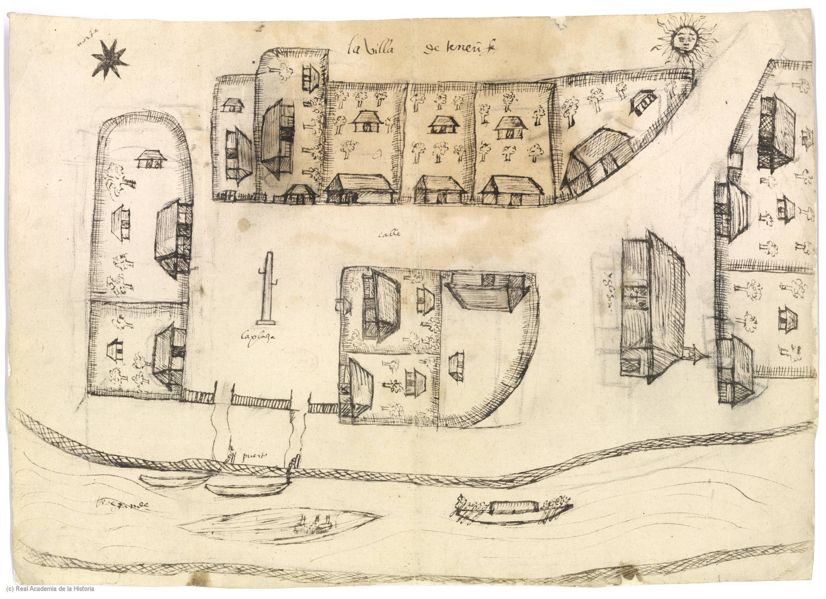 Plano de la villa de Tenerife, en la actual Colombia, realizado en 1580. Contenido en la Relación Geográfica de la villa de Tenerife, gobernación de Santa Marta, de Bartolomé Briones de Pedraza, conservado en la Real Academia de la Historia.